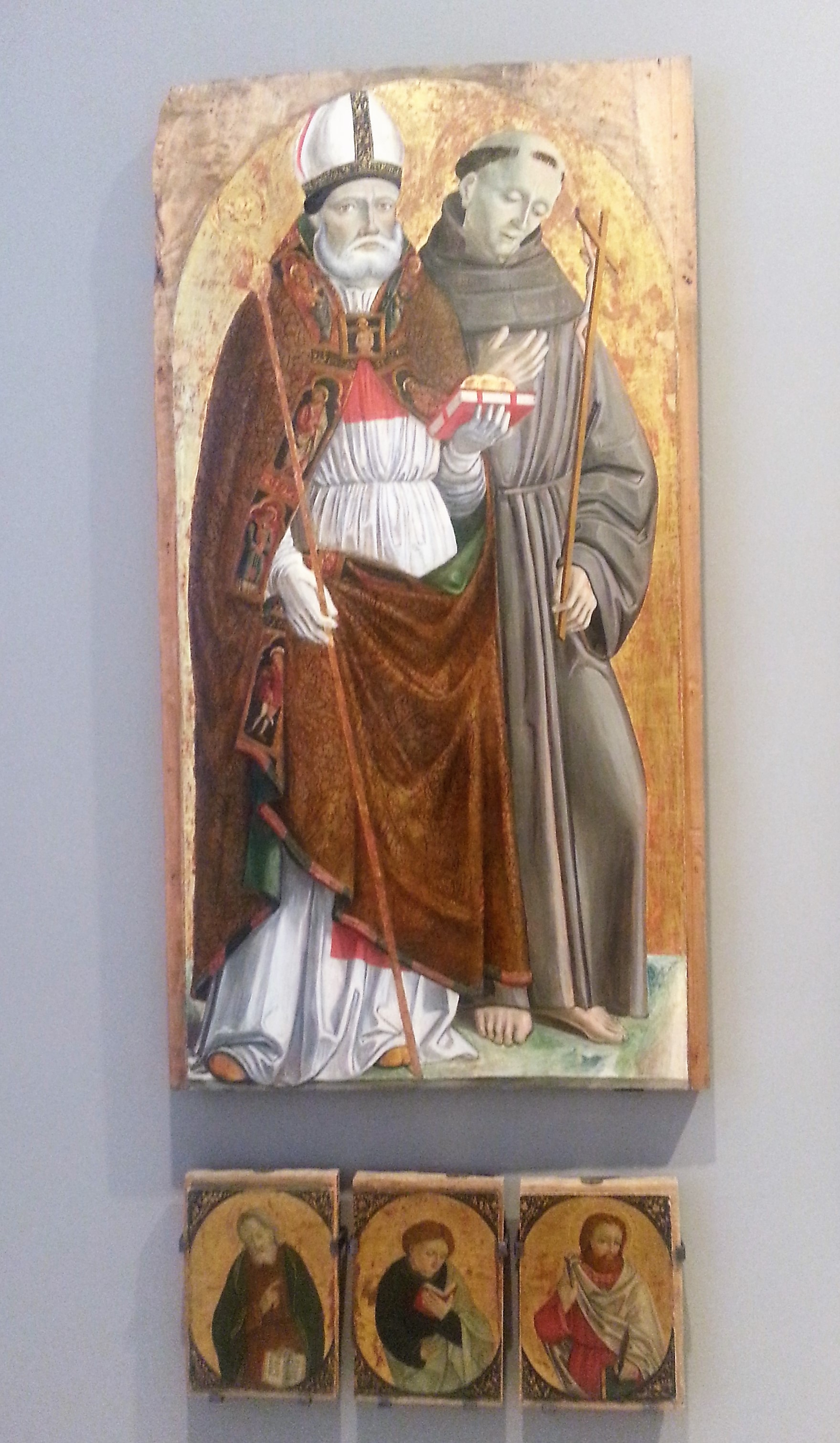 Polittico del Romacolo con le tre immagini di santi